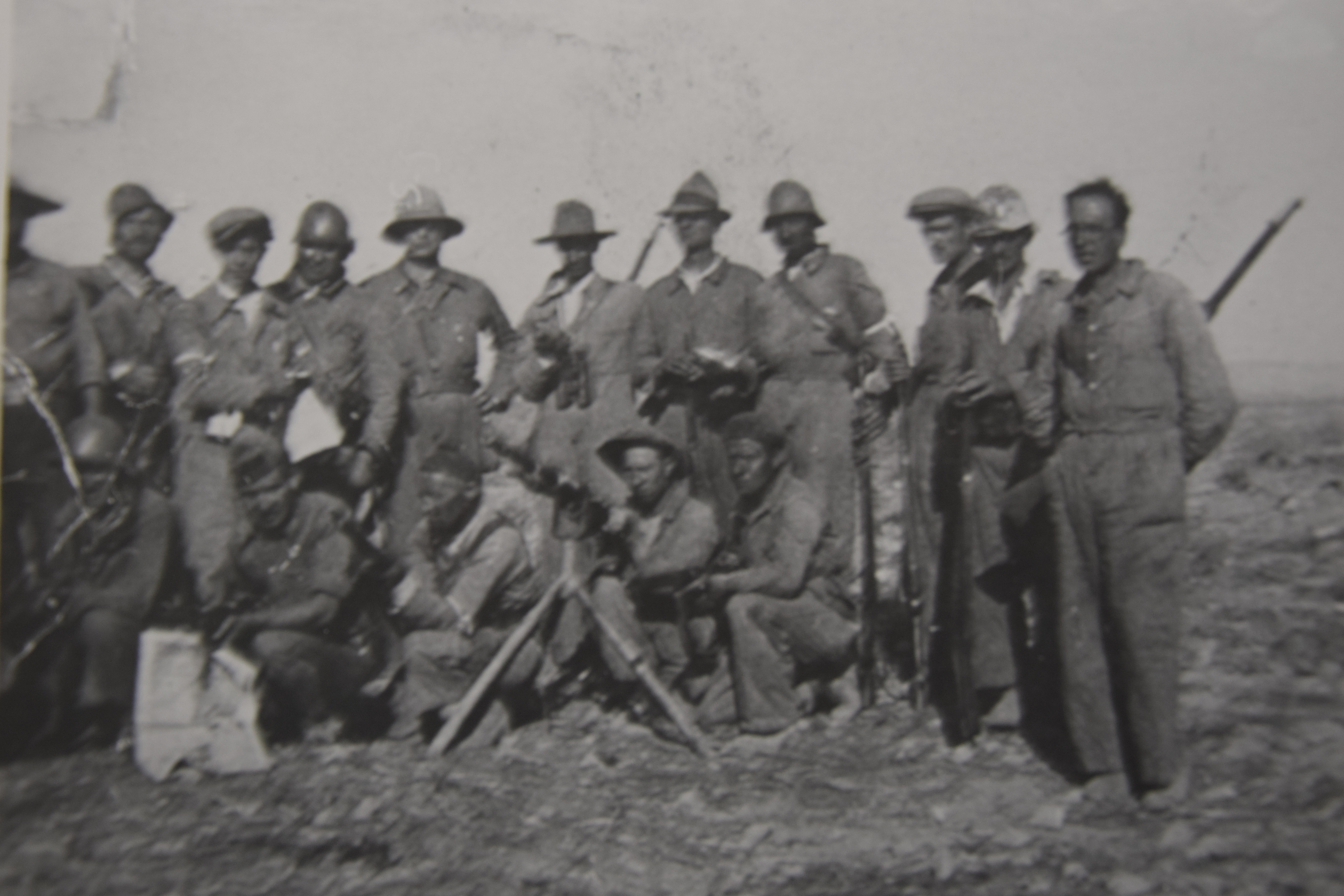 bataillon « Matteotti » avec Carlo Rosselli (debout extr. droite) et Guido "di fu Torello" Checchi (à genoux extr. droite), Monte Paledo, 1936